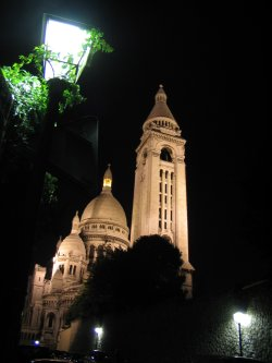 Description: Paris, août 2004.Photo du sacré coeur Auteur: David Le Brun